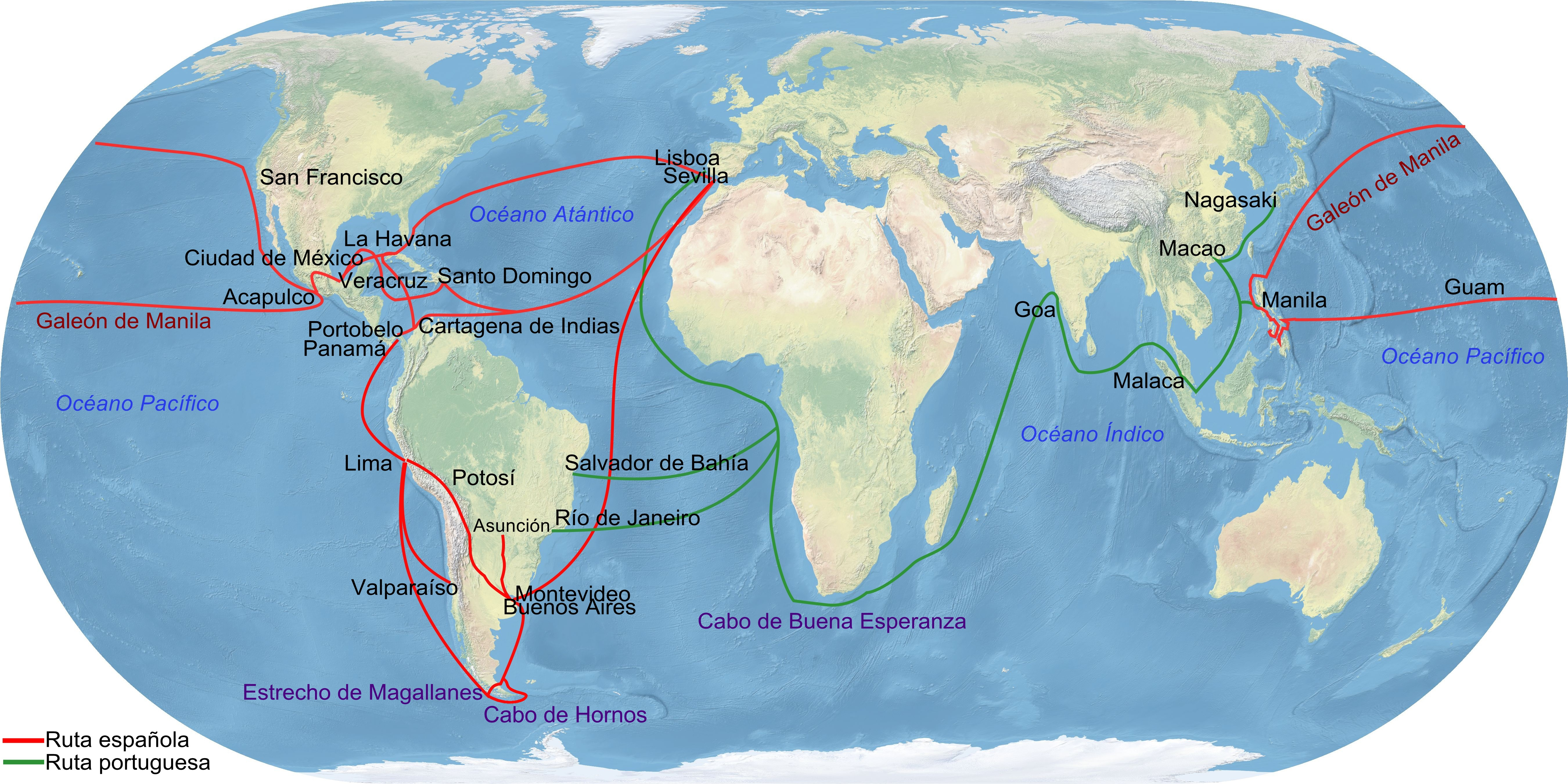 Mapa donde se muestran las principales rutas comerciales del Imperio Español. Se muestran tanto las rutas españolas como las portuguesas, en principio rivales de las españolas, aunque las coronas de España y Portugal se unificarían entre 1580 y 1640. Están rotulados algunos de los principales puertos o ciudades interiores en las rutas, pero no están todos los que son ni son todos los que están. Me han servido este artículo, este otro o este otro para configurar algunos puntos, además de los recorridos de las rutas con Macao. El mapa sobre el que se han colocado las indicaciones es obra de Ktrinko, y se encuentra en Commons con el nombre de Eckert4.jpg